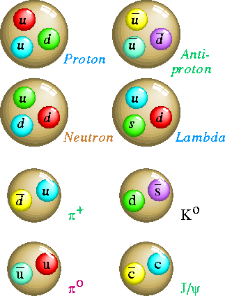 Barion